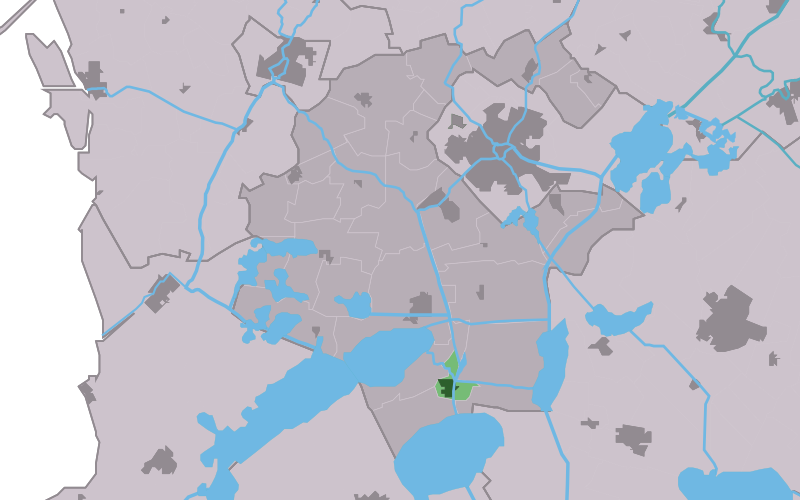 Kaartsje fan himrik fan Wâldsein